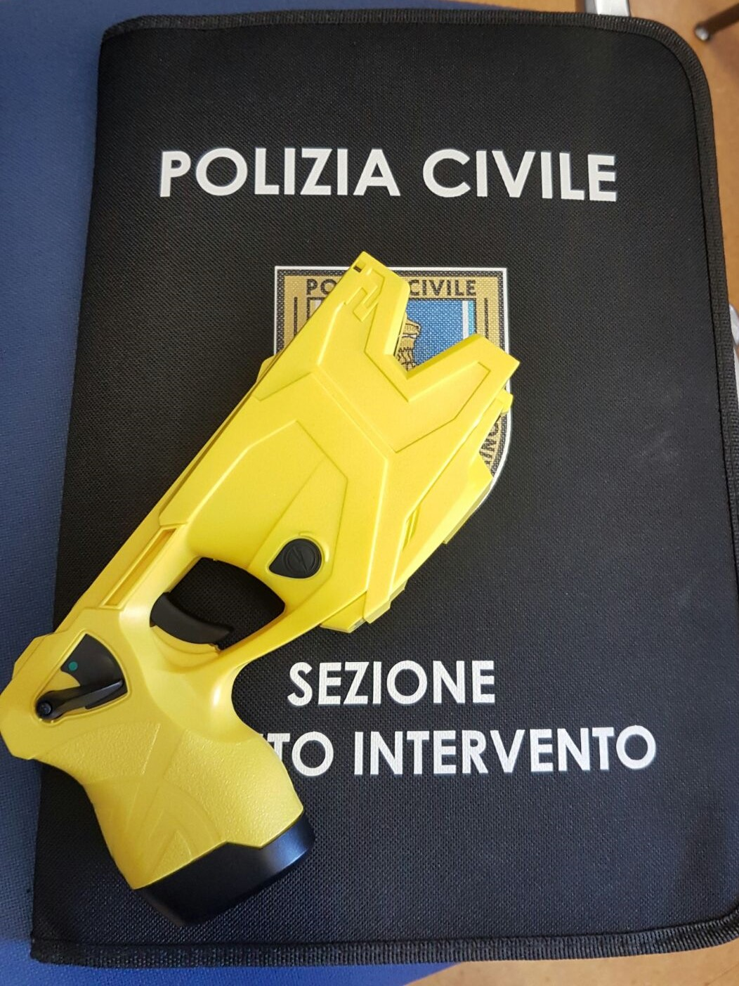 taser x26 in dotazione alla Polizia Civile San Marino.